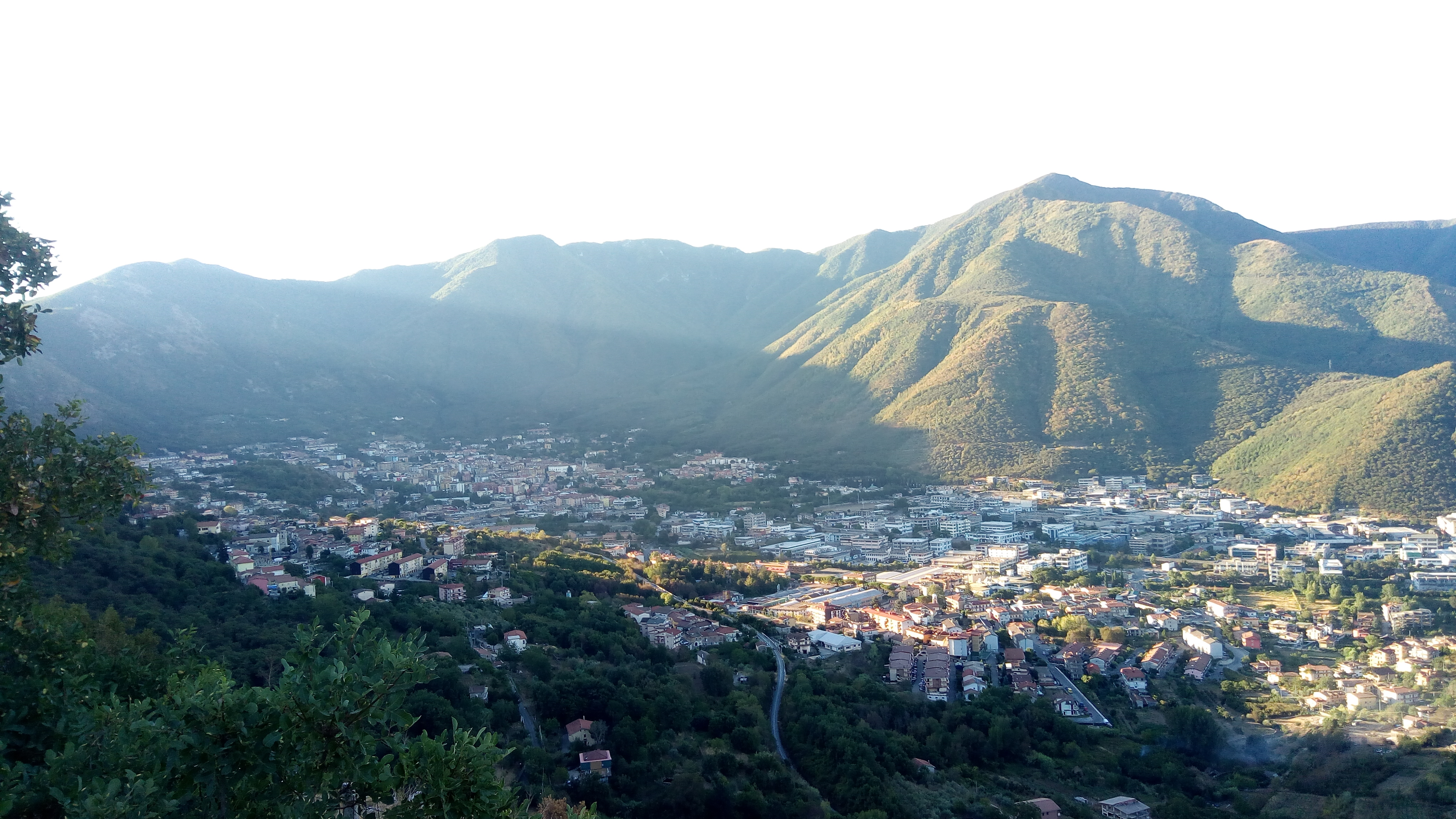 Panorama di Solofra, vista dalla località Castelluccia.